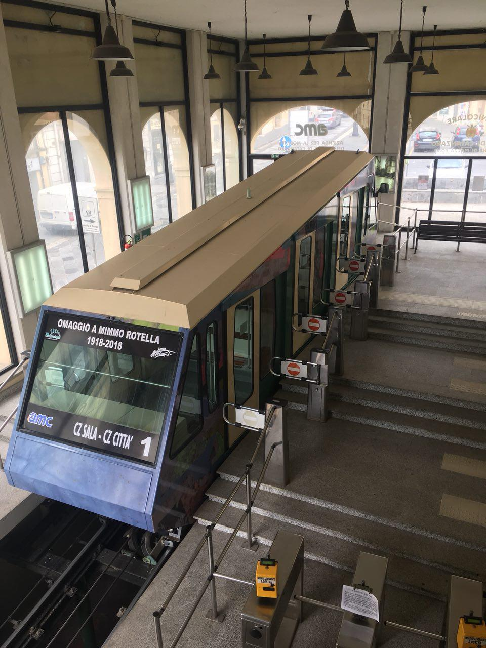 Restyling della funicolare 2018 in omaggio a Mimmo Rotella